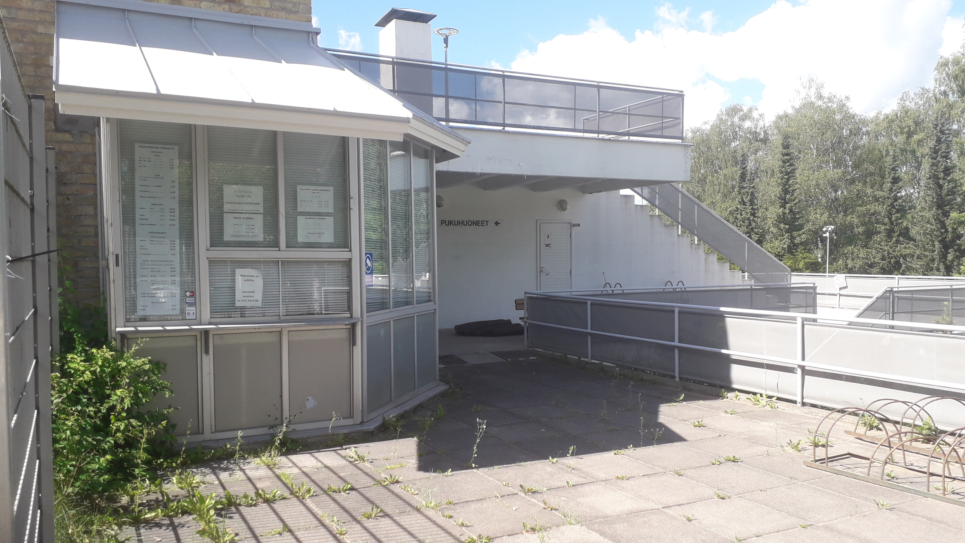 Riihimäen maauimalan sisäänkäynti heinäkuussa 2020. Maauimala on kuvaushetkellä suljettu koronaepidemian vuoksi.